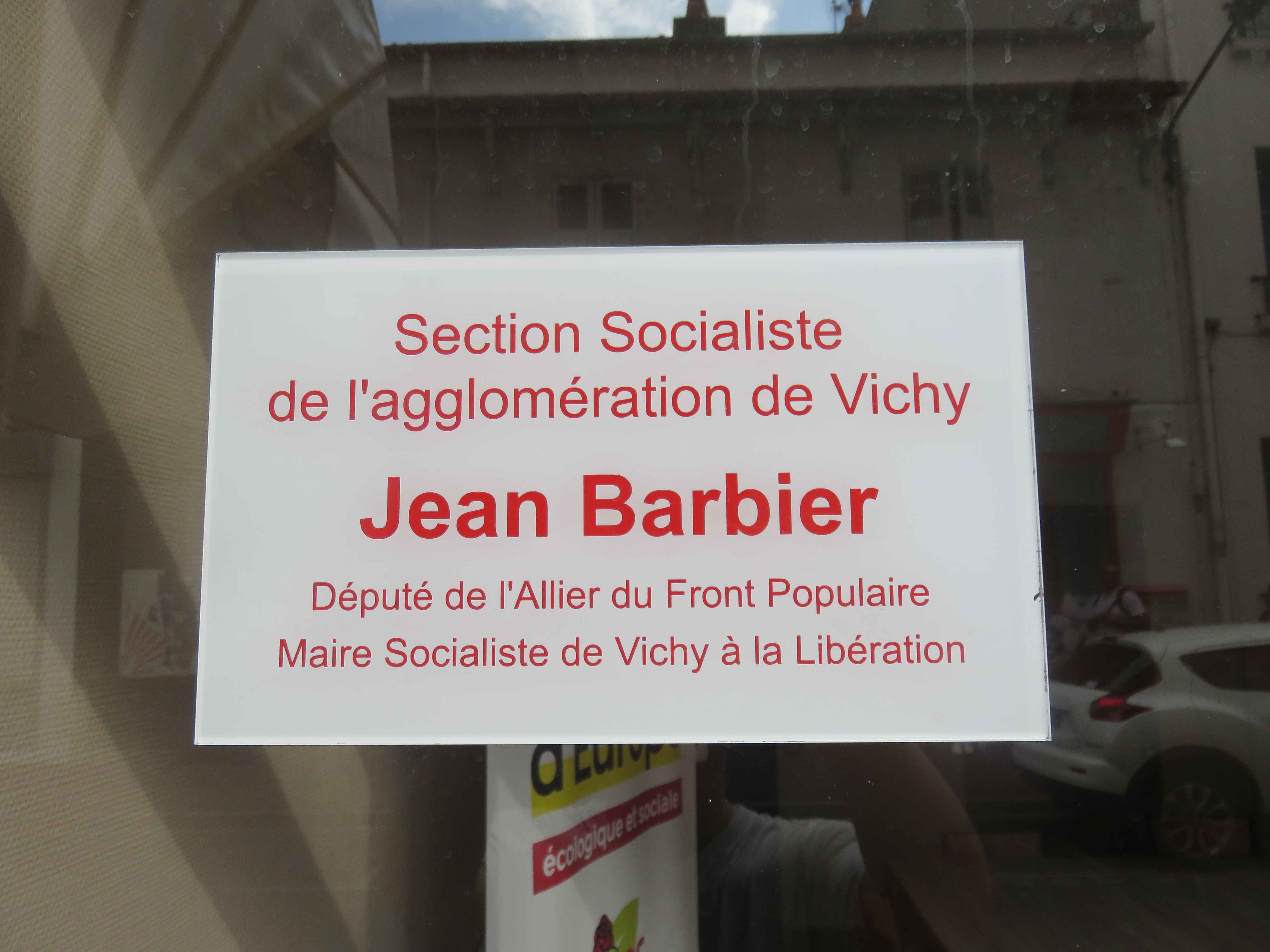 Local de la section socialiste de l'agglomération de Vichy, au 36 rue Salignat à Vichy (Allier, France). Ce local est nommé en l'honneur de Jean Barbier, ancien député-maire socialiste de la ville.